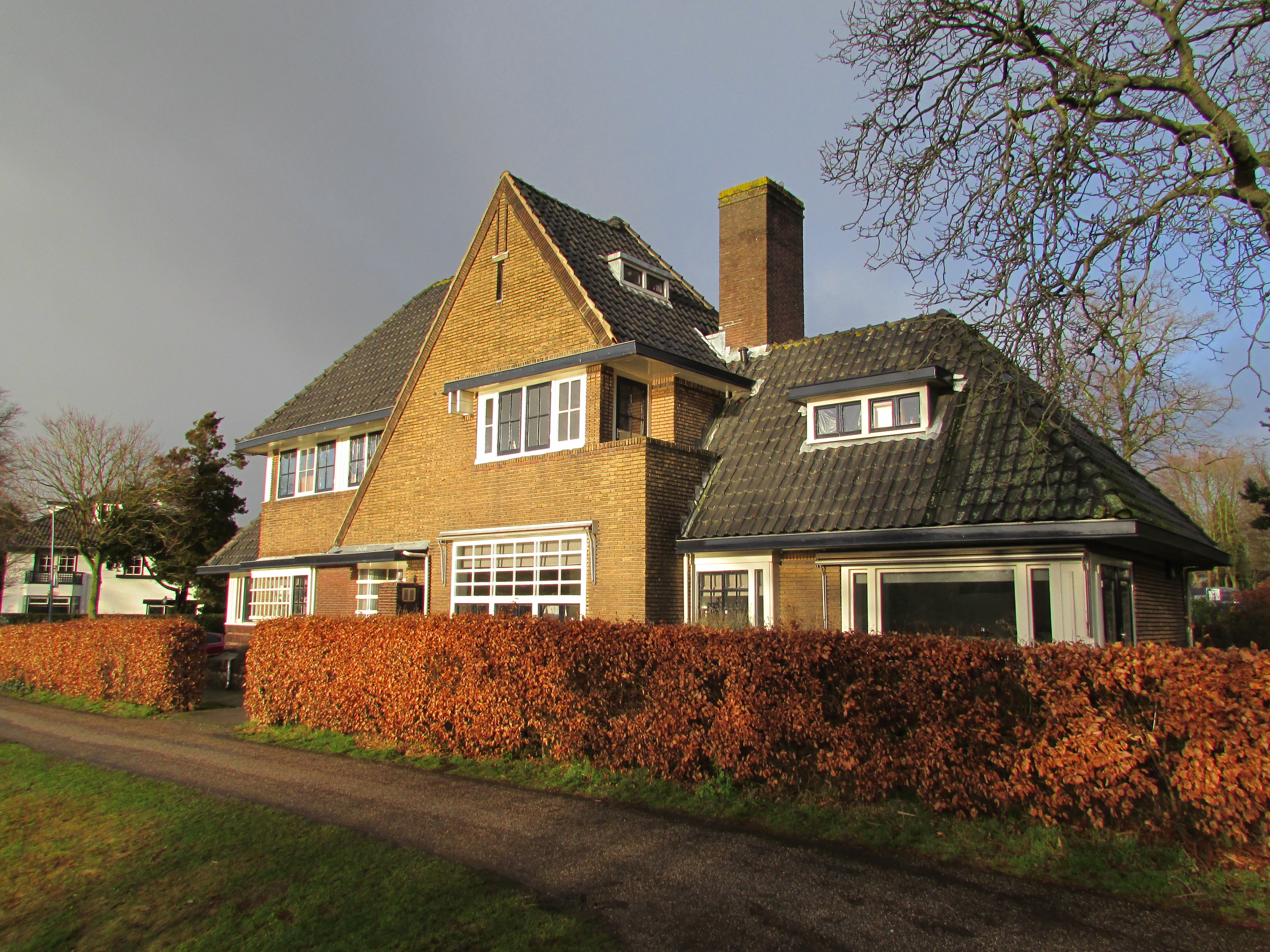 Het landhuis is gebouwd in 1928, naar een ontwerp van de architect Nic. Andriessen. Het landhuis is gebouwd in een voor de bouwtijd karakteristieke Interbellumstijl met verspringende gevelpartijen en het accent op de kap. Het pand maakt deel uit van een reeks door Andriessen ontworpen landhuizen aan de Laapersweg.